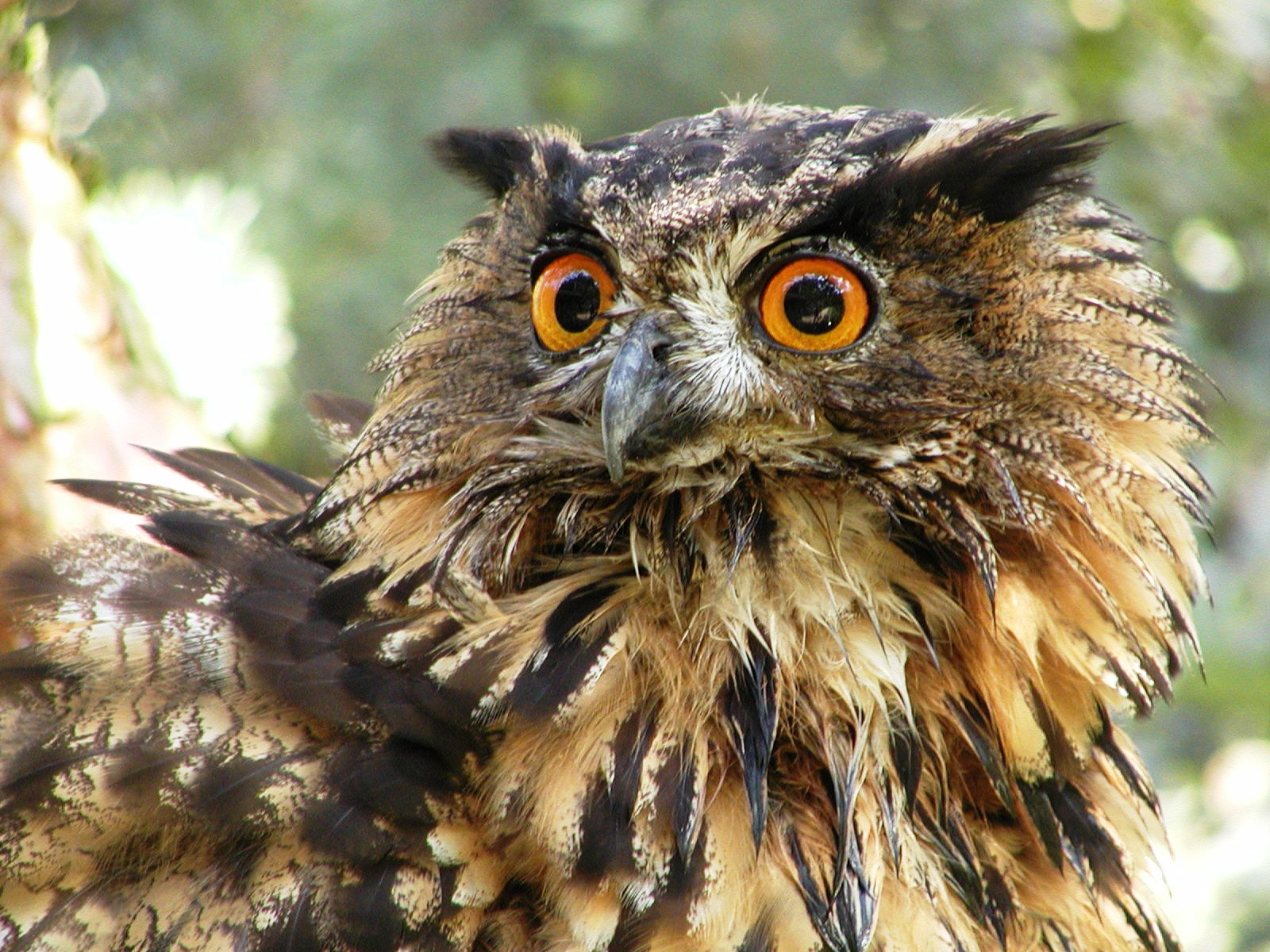 Uhu im Wildpark-MV, Güstrow